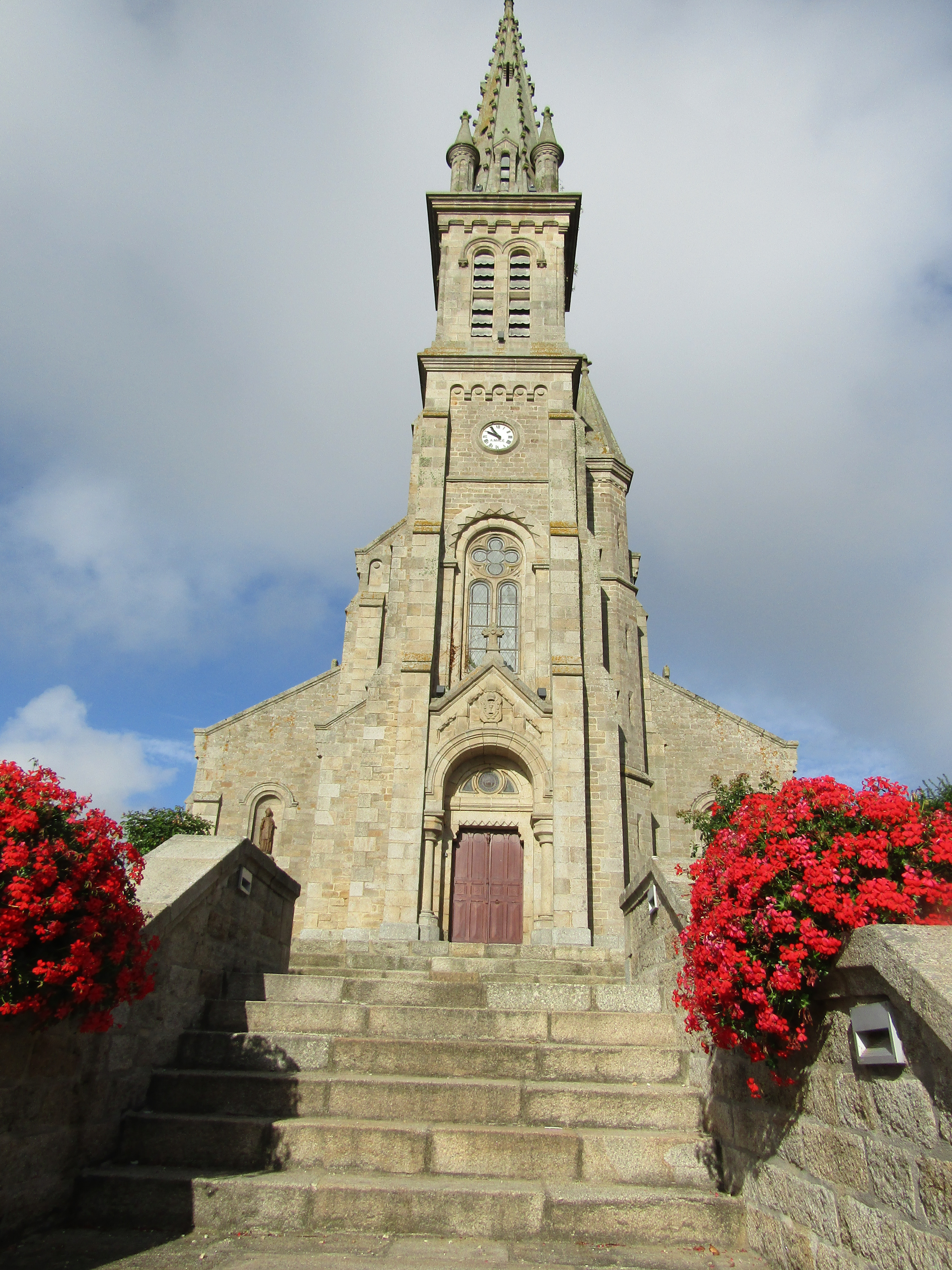 L'église Saint-Donan à Saint-Donan